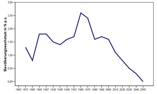 Jährliches Bevölkerungswachstum Chiles seit 1865 und Prognose bis 2050. Datenquellen sind Nohlen, Dieter (1973): Chile, das sozialistische Experiment, S. 339; Instituto Nacional de Estadísticas: Anual growths of the population of Chile since 1865 with a forecast till 2050. Sources of data: Nohlen, Dieter (1973): Chile, das sozialistische Experiment, S. 339; Instituto Nacional de Estadísticas